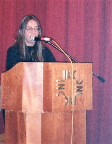 Isabel Sabogal, Cusco 2004